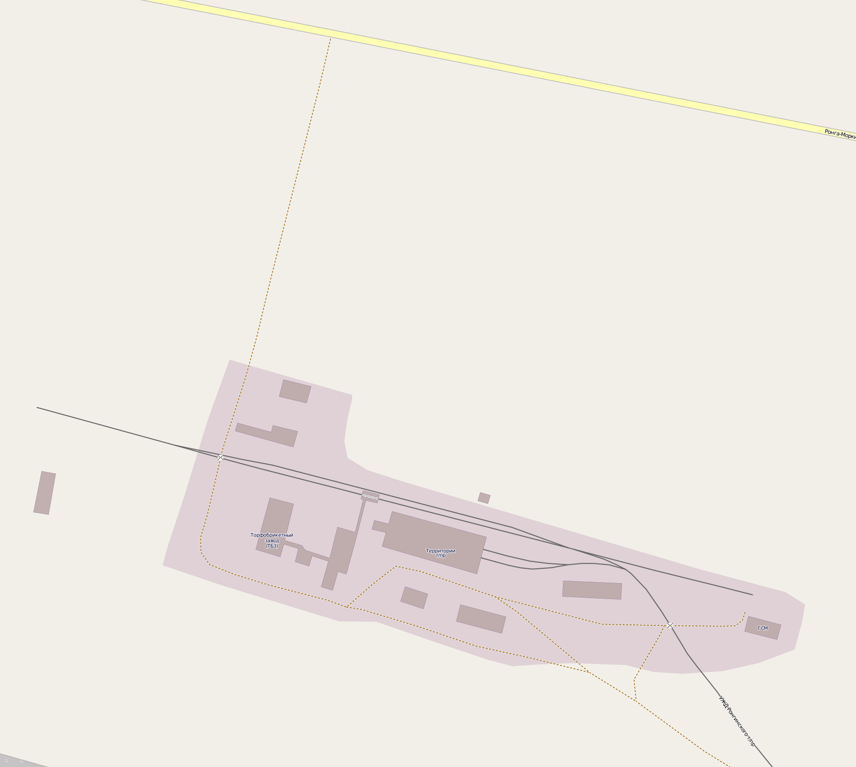 Узкоколейная железная дорога Ронгинского торфопредприятия